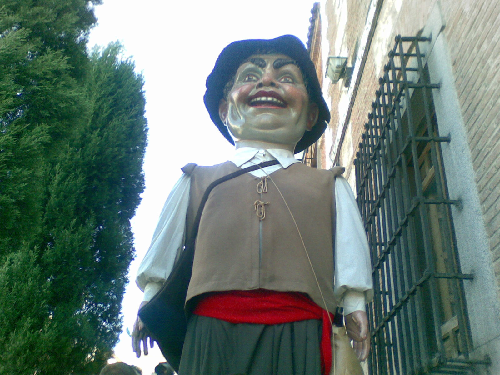 Gigantes de Alcalá de Henares